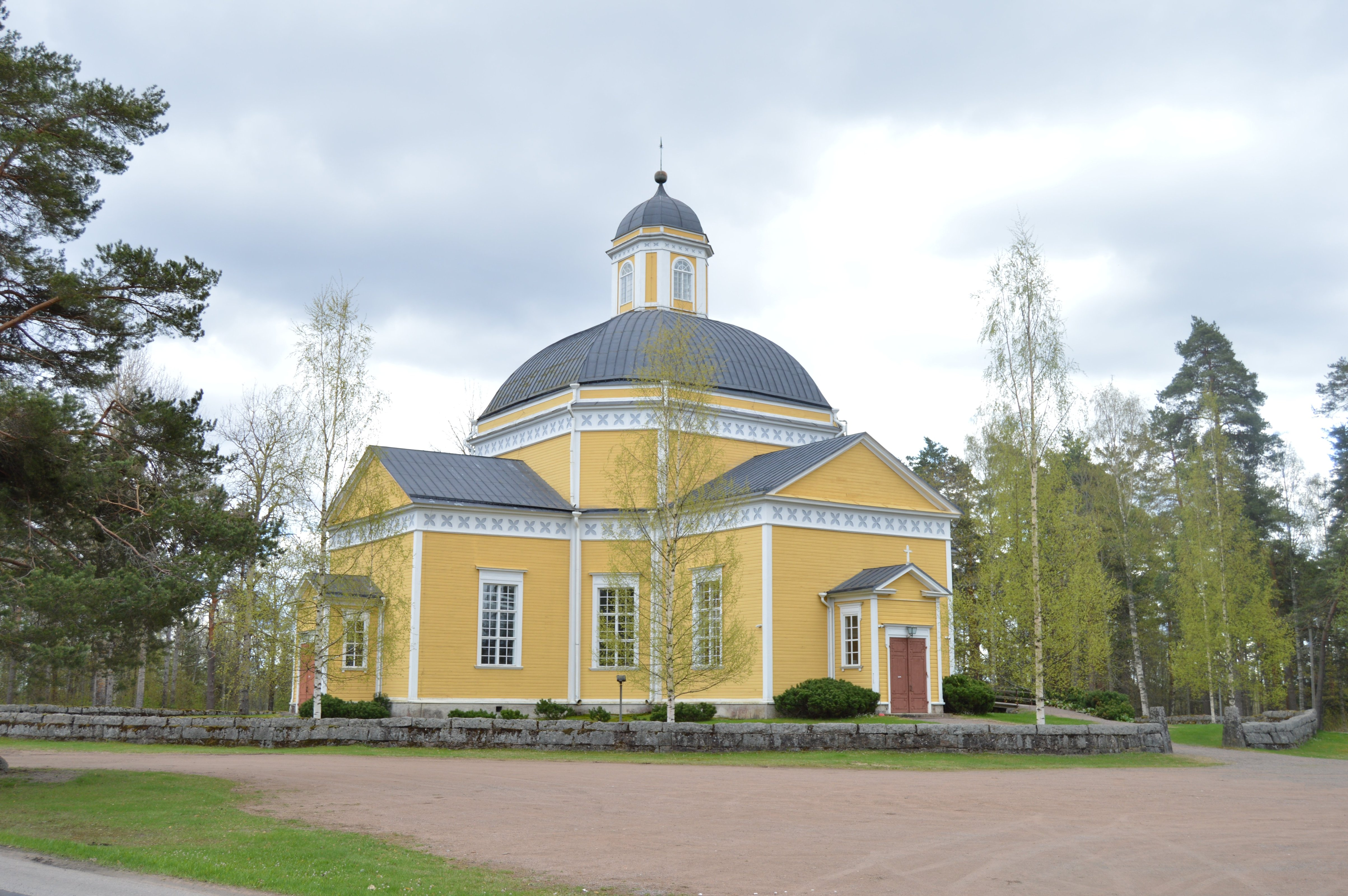 Luumäen kirkko